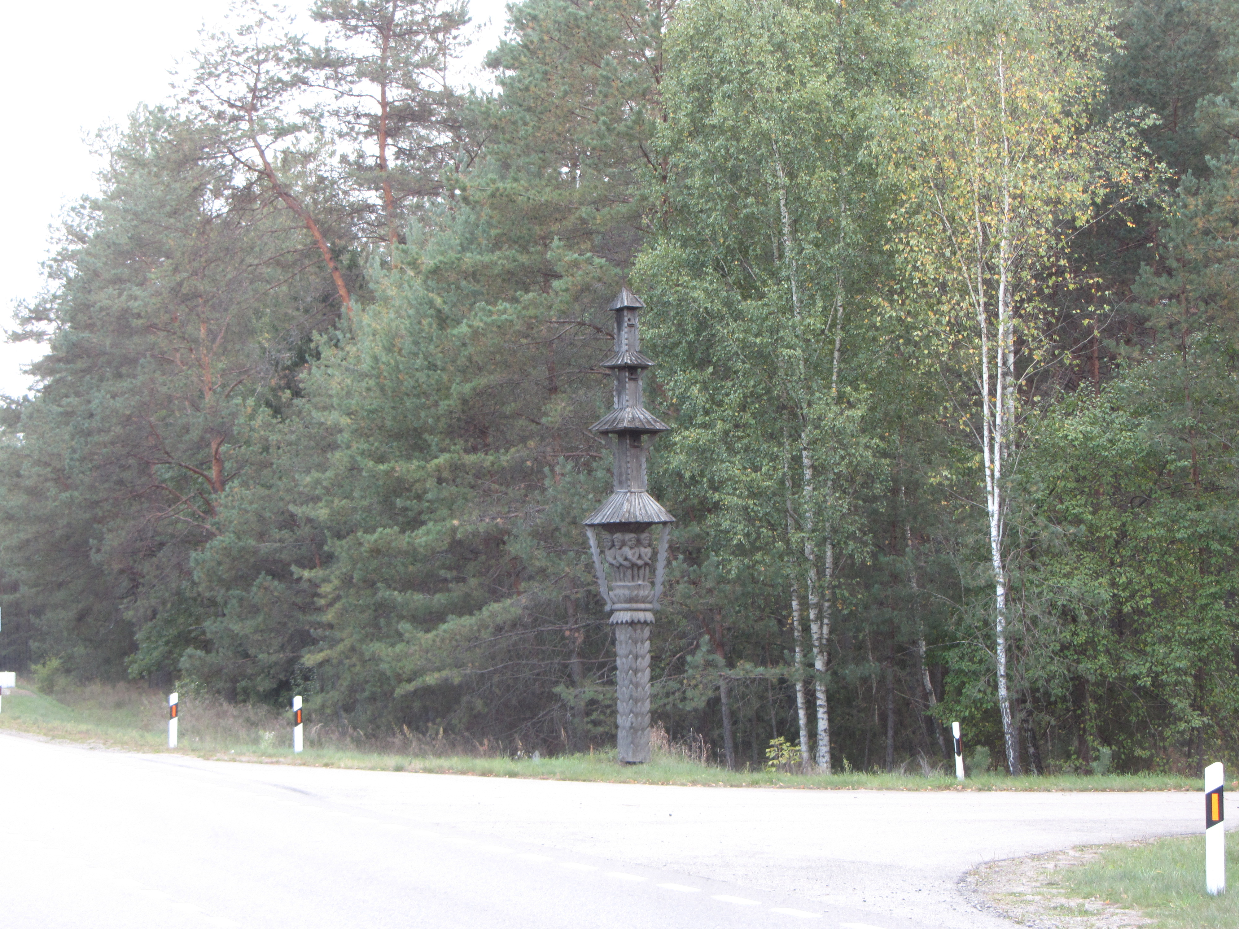 Viečiūnų sen., Lithuania